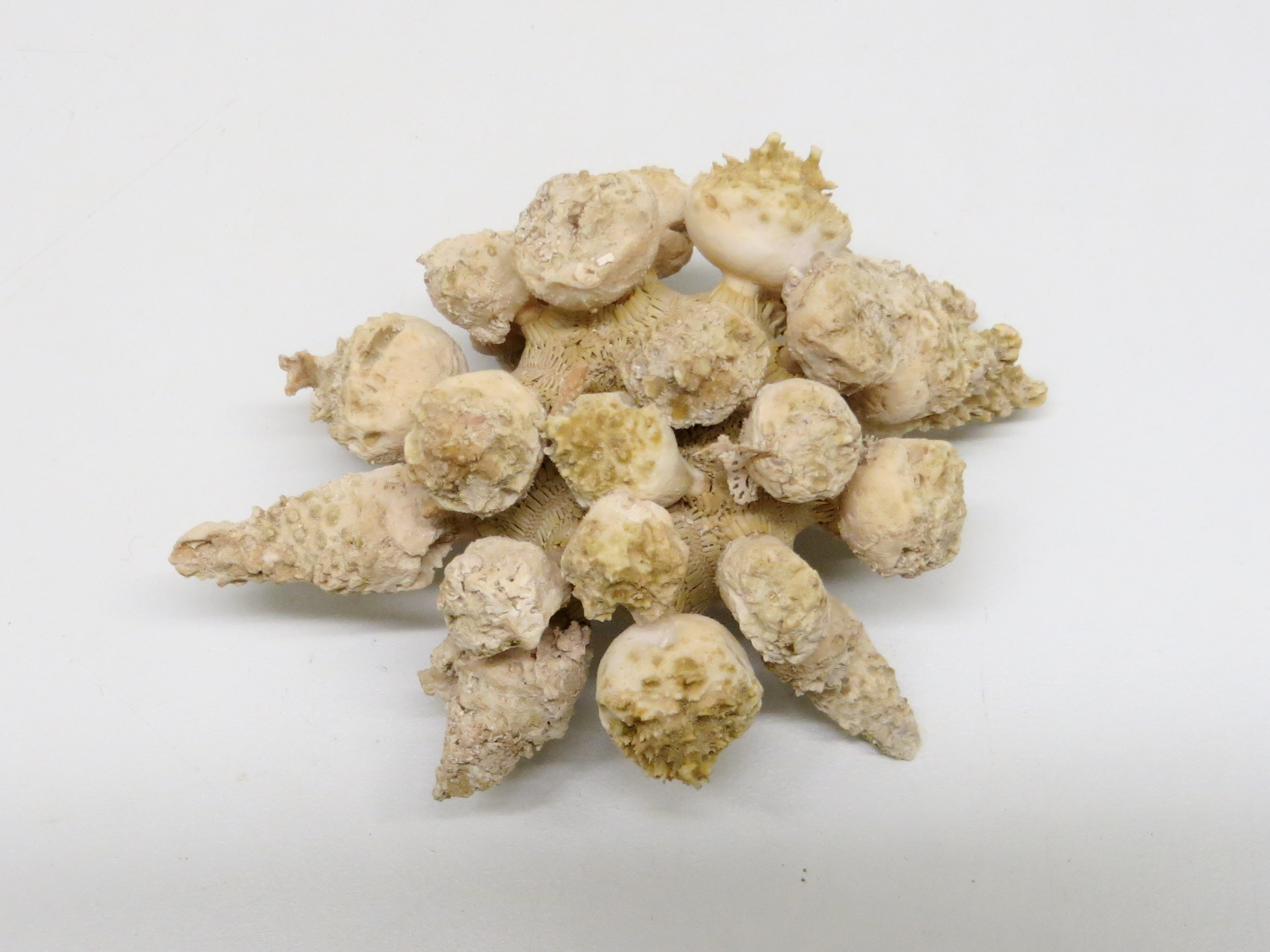 Tylocidaris ohshimai (ex-Psychocidaris, collection du Muséum National d'Histoire Naturelle).